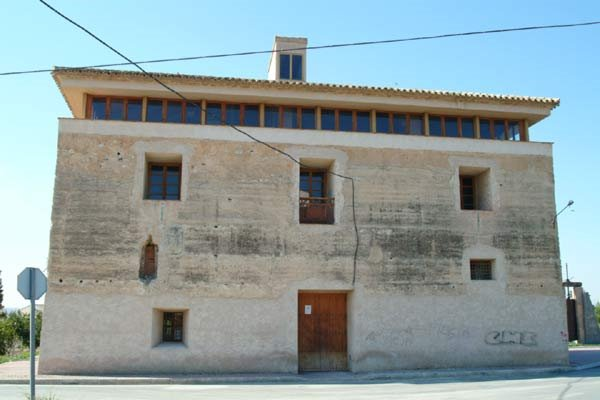 La torre Vieja, del Obispo o de los Moros, nombres por la que se le ha conocido, para muchos es la fortaleza en pie mas antigua de toda la Región de Murcia.